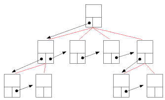 Implementierung eines allgemeinen Baumes über einen Binärbaum